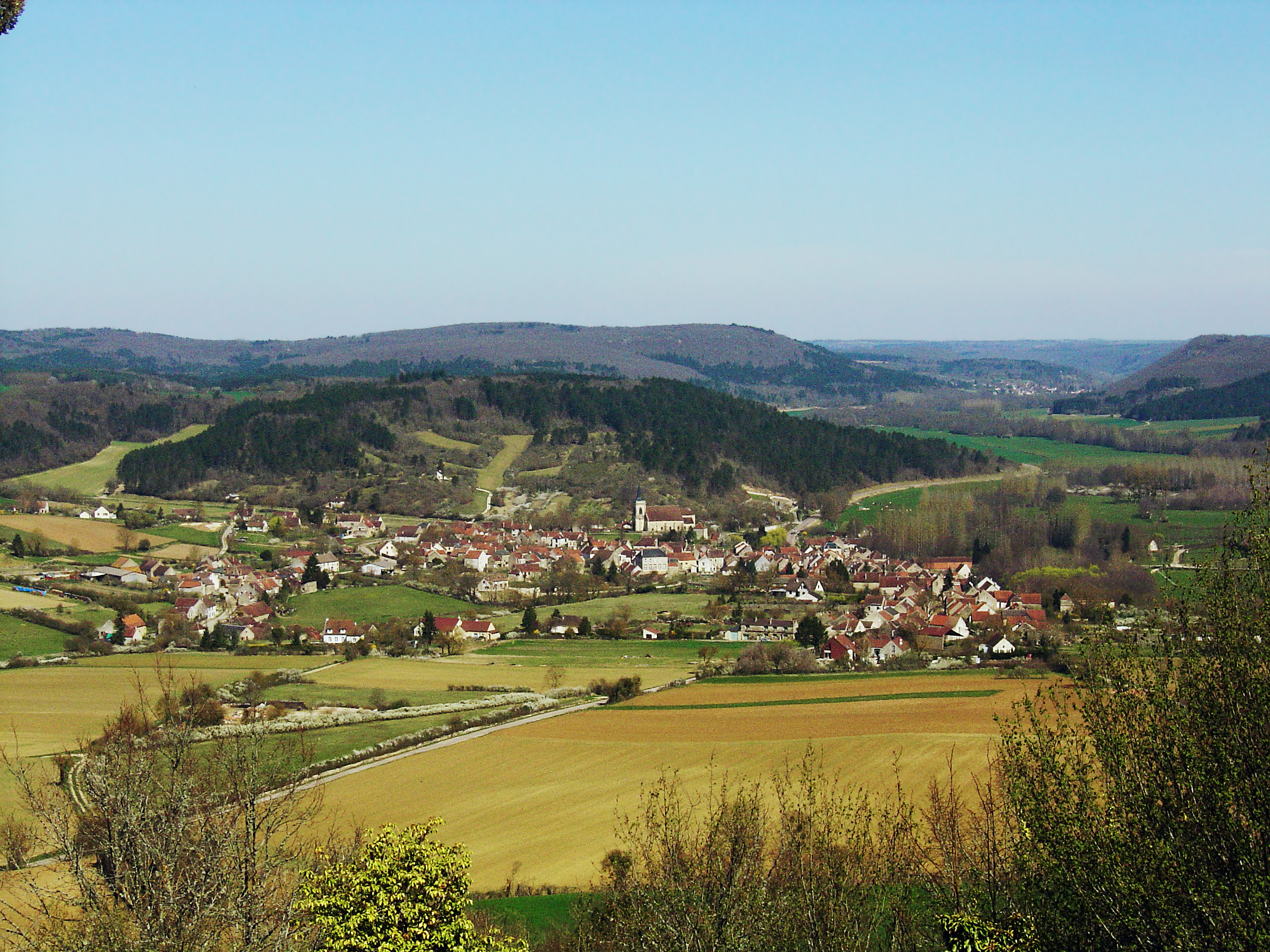 Vue générale d'Asquins depuis Vézelay